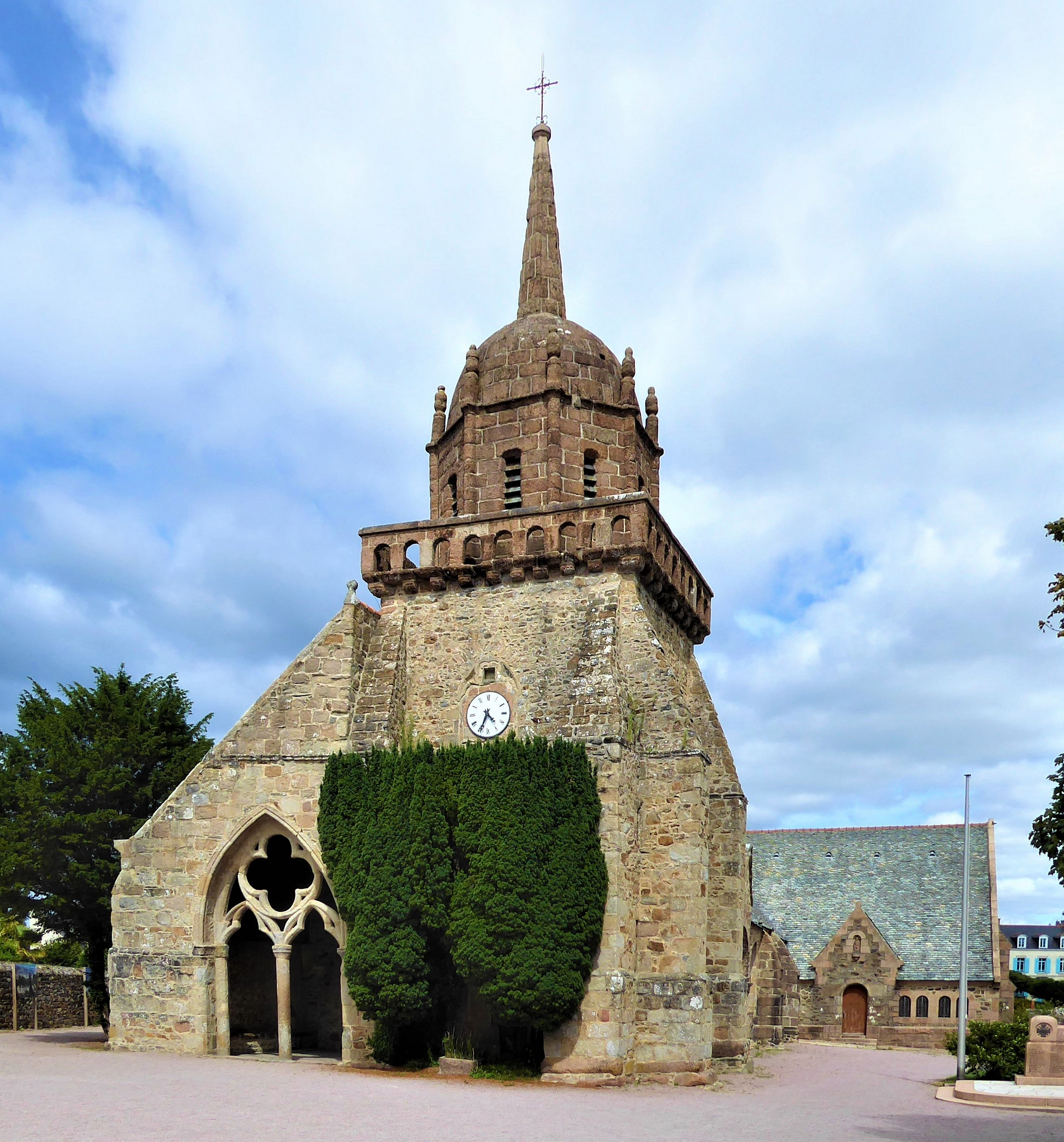 Église Saint-Jacques de Perros-Guirec